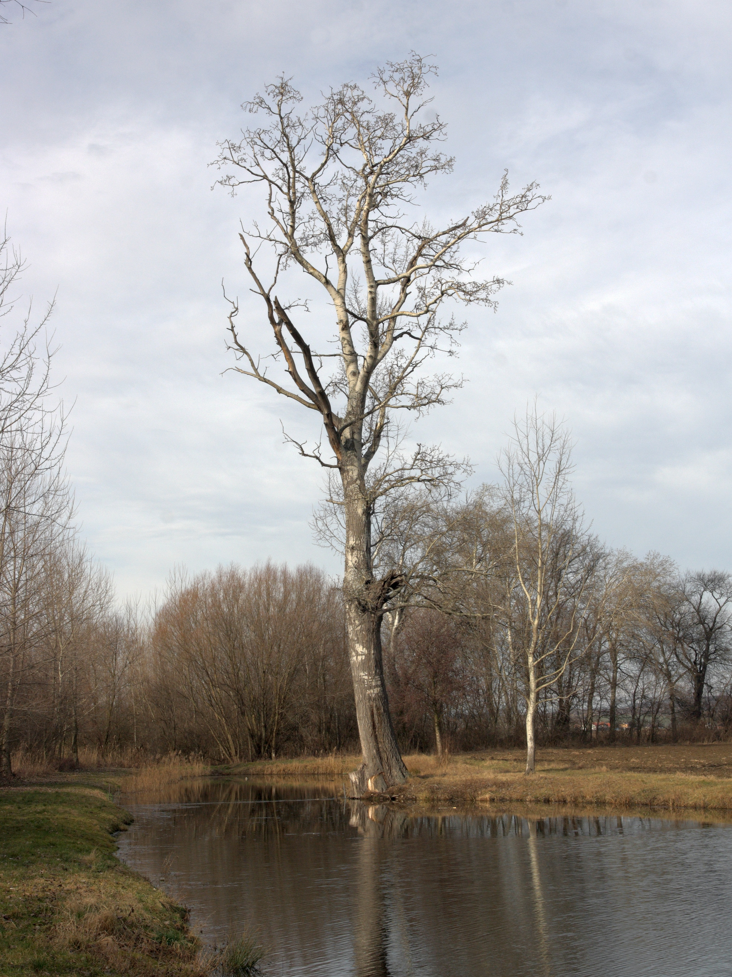 Přírodní park Niva Jihlavy - topol bílý u Malešovic.